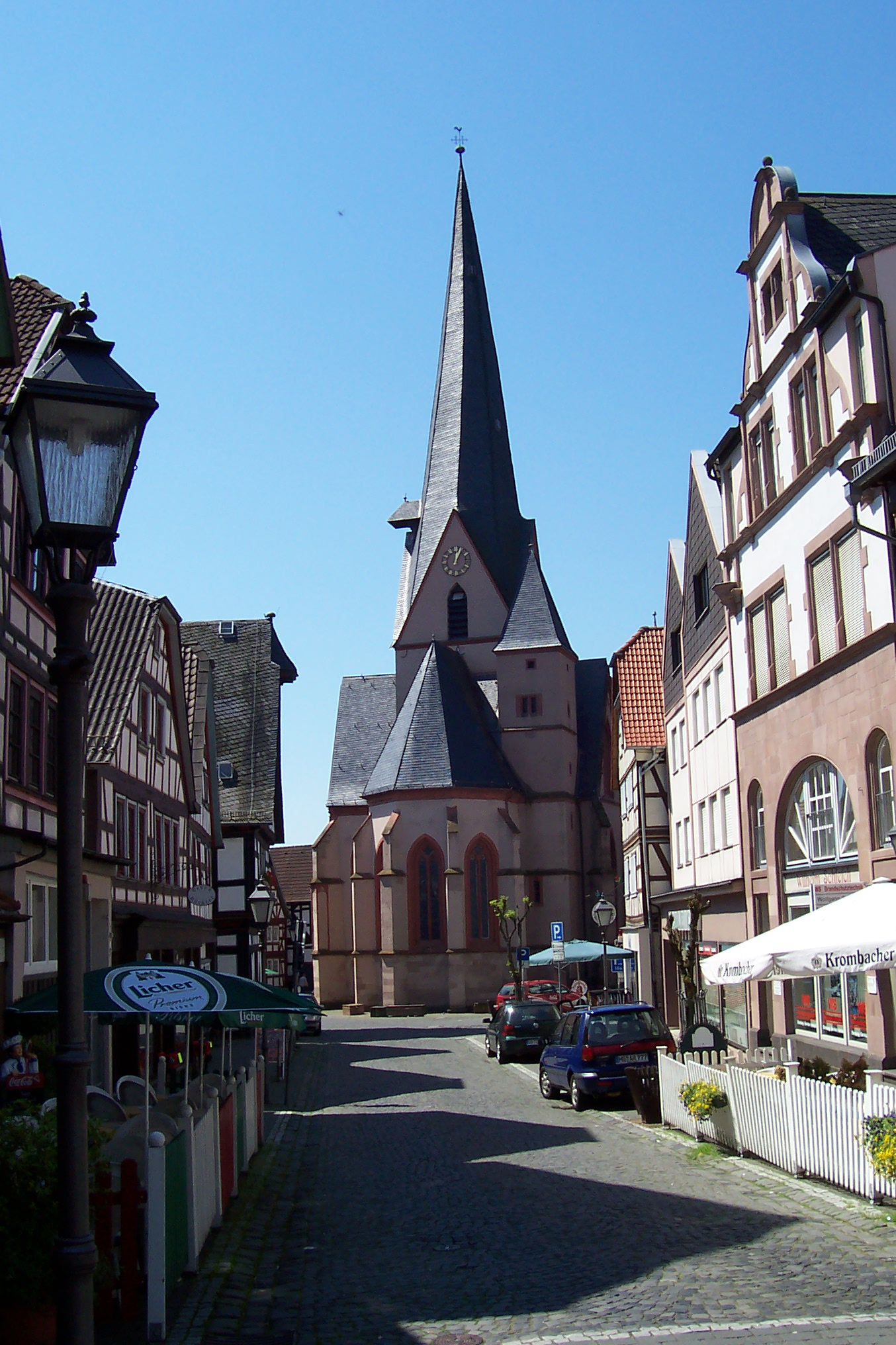 Martkstadt Schotten, Marktstrasse und Liebfrauenkirche Foto 2005, Matthias Monien